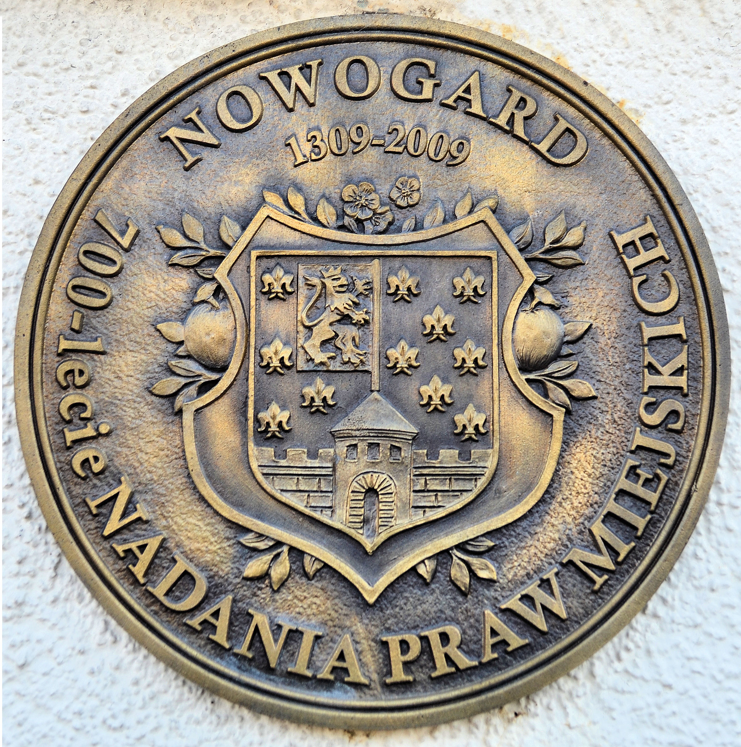 Plakieta na ratuszu w Nowogardzie upamiętniająca 700-lecie praw miejskich